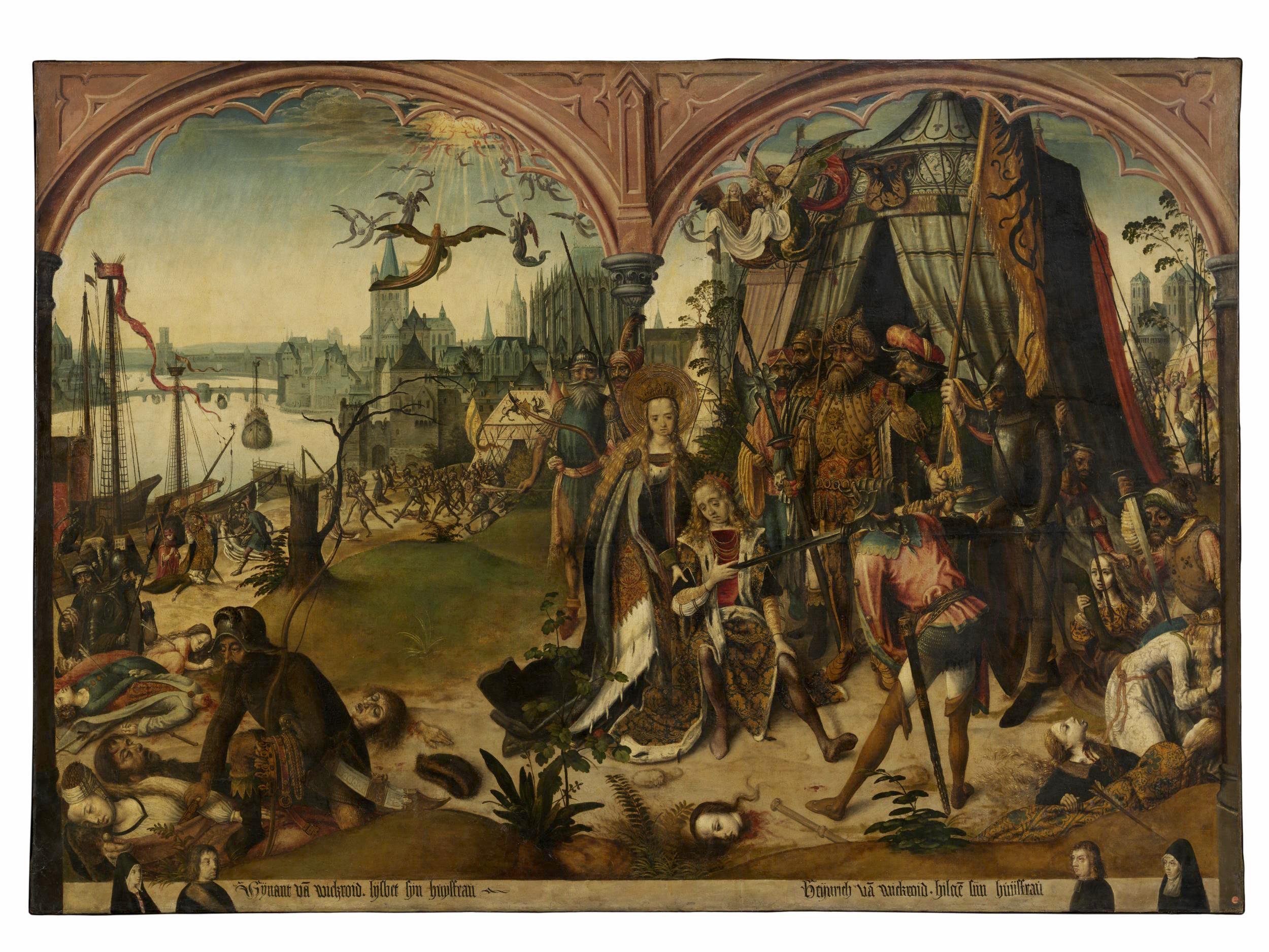 Maître de la Légende de saint Ursule 16. Martyre